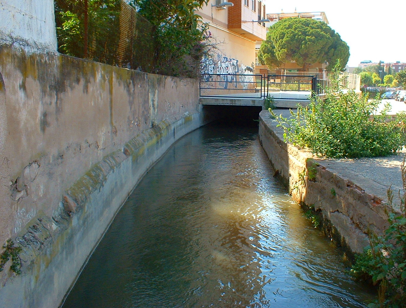 Sèquia de Montcada